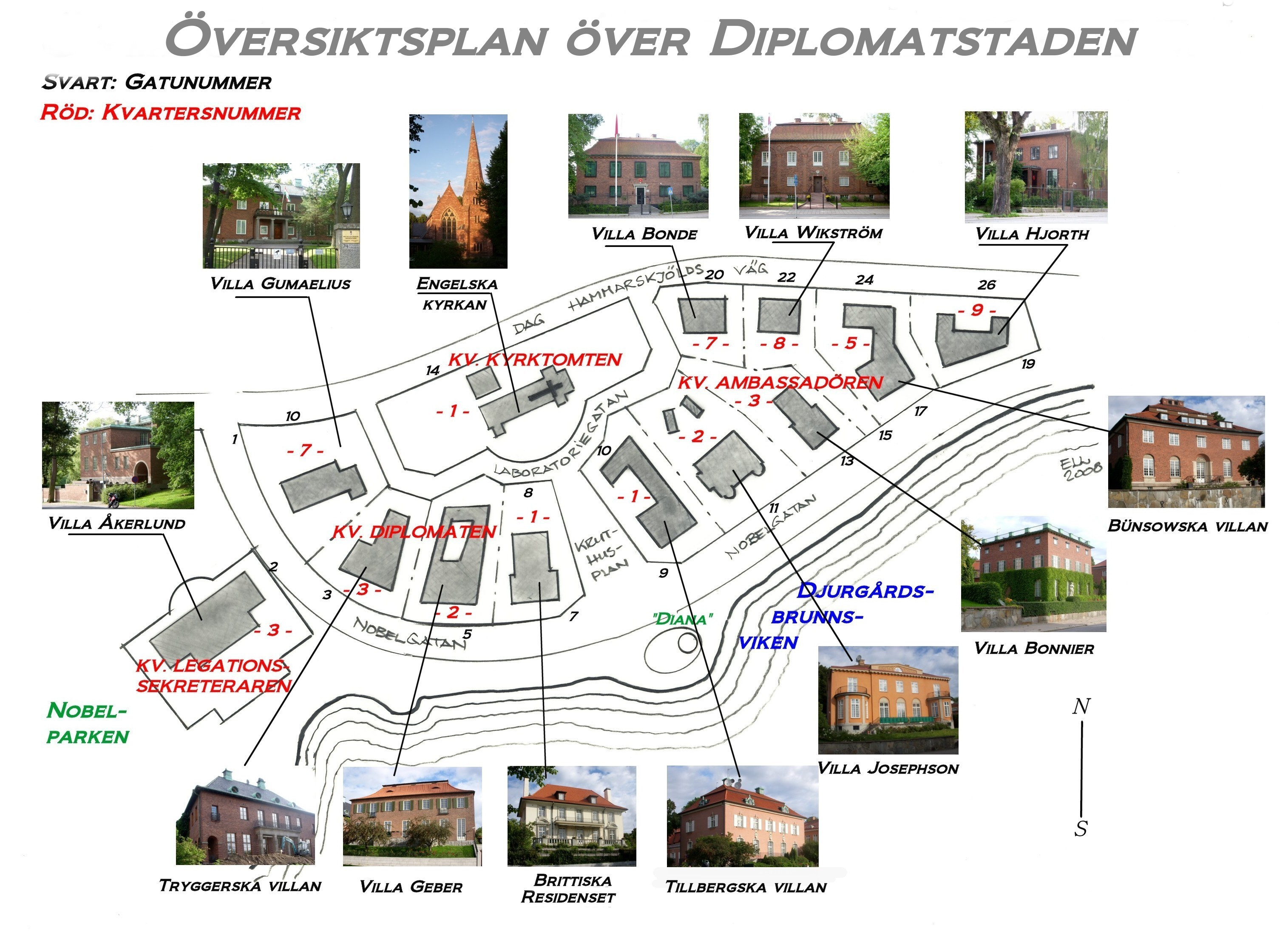 Översiktsplan för Diplomatstaden i Stockholm